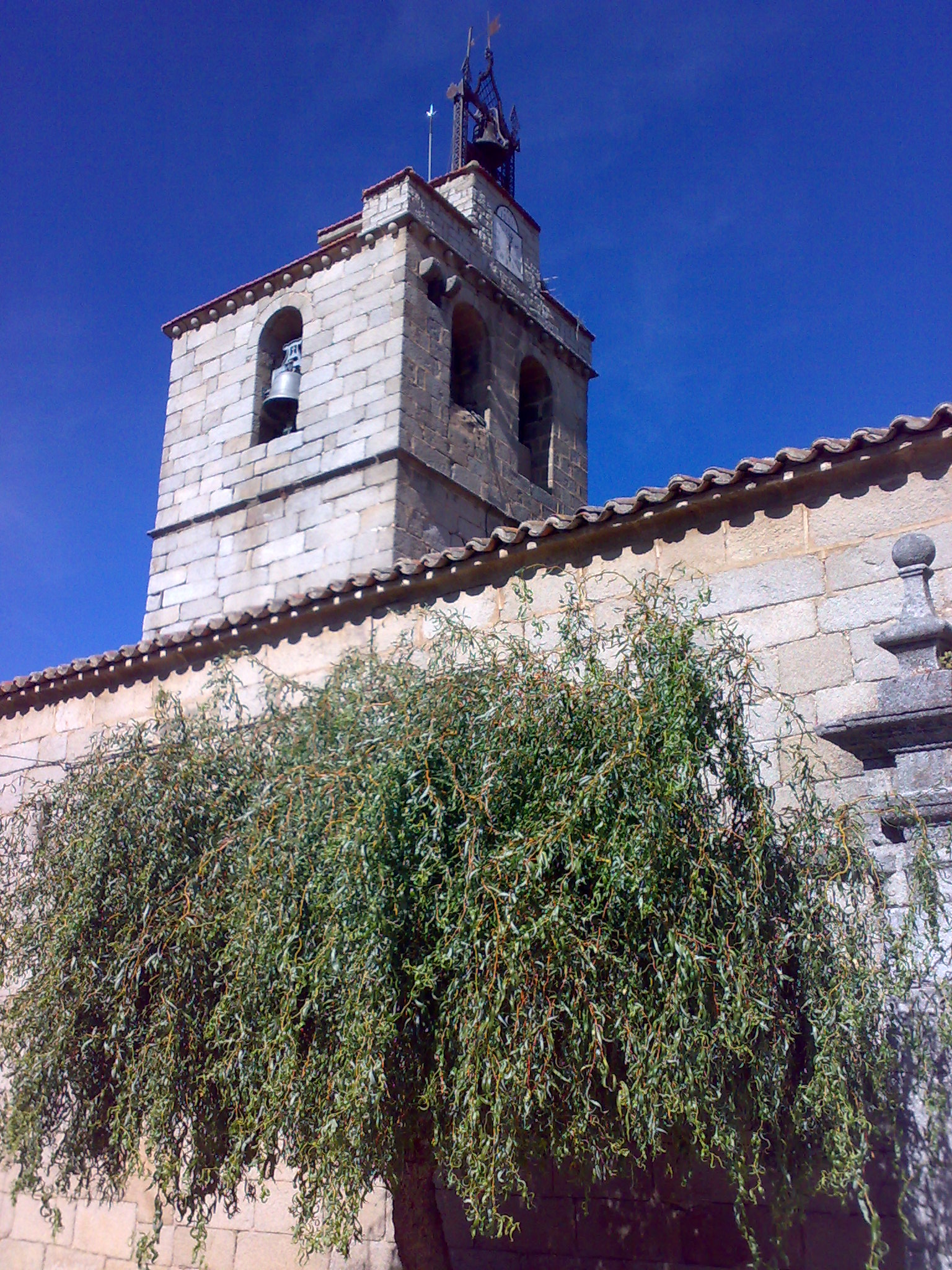 Iglesia de Diego Alvaro, Avila (España)